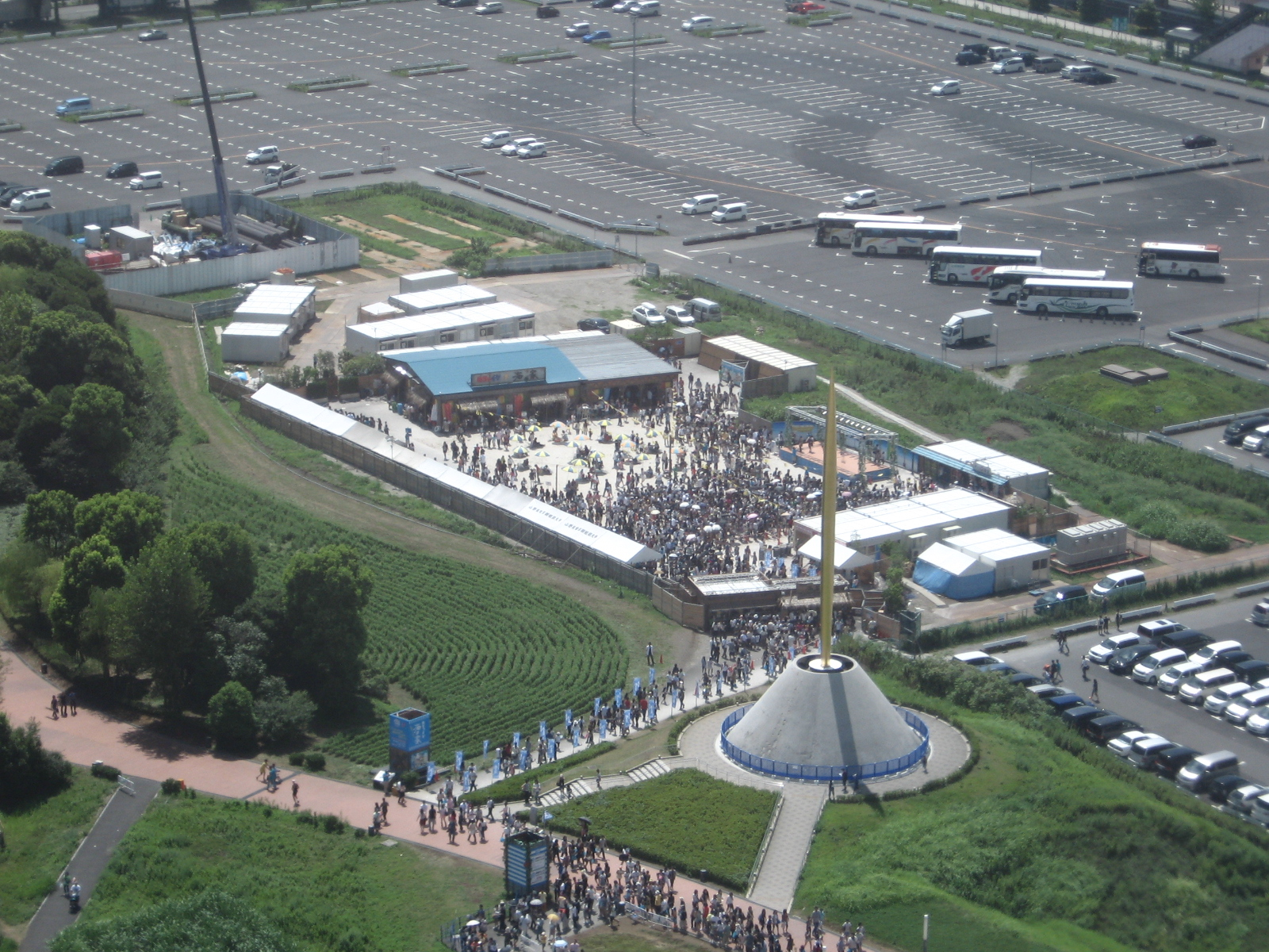 フジテレビ主催イベント『お台場冒険王ファイナル』（2008年7月19日～8月31日、東京・台場で開催）会場の「めちゃイケ海の家」（フジテレビ本社24階から眺望、2008年8月27日撮影）